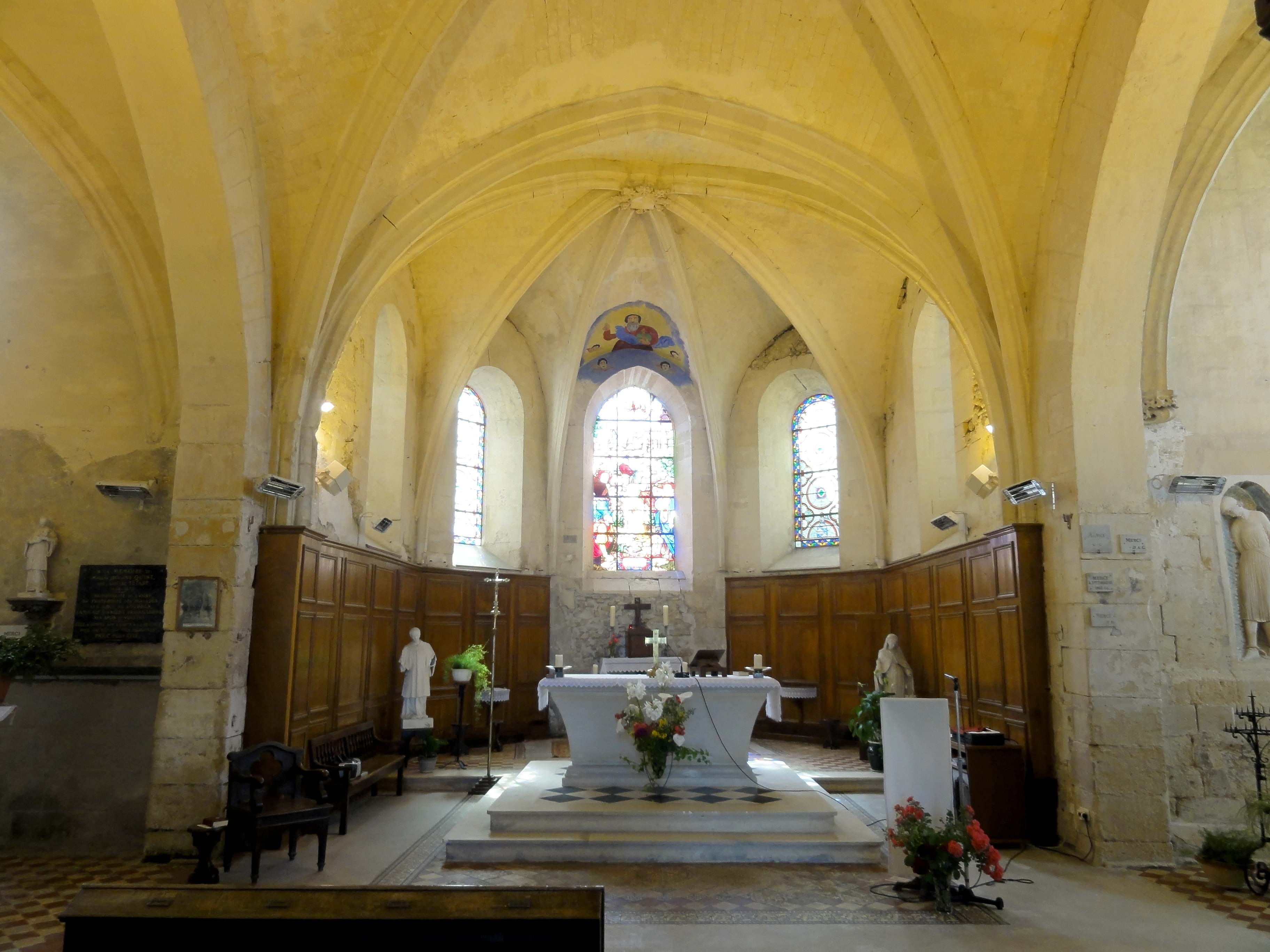 Intérieur de l'église (voir titre).